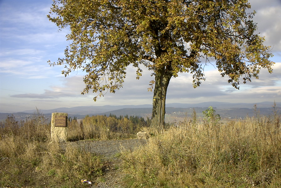 Naučná stezka manželů Scheybalových okres Jablonec nad Nisou Pamětní deska malíře Richarda Felgenhauera